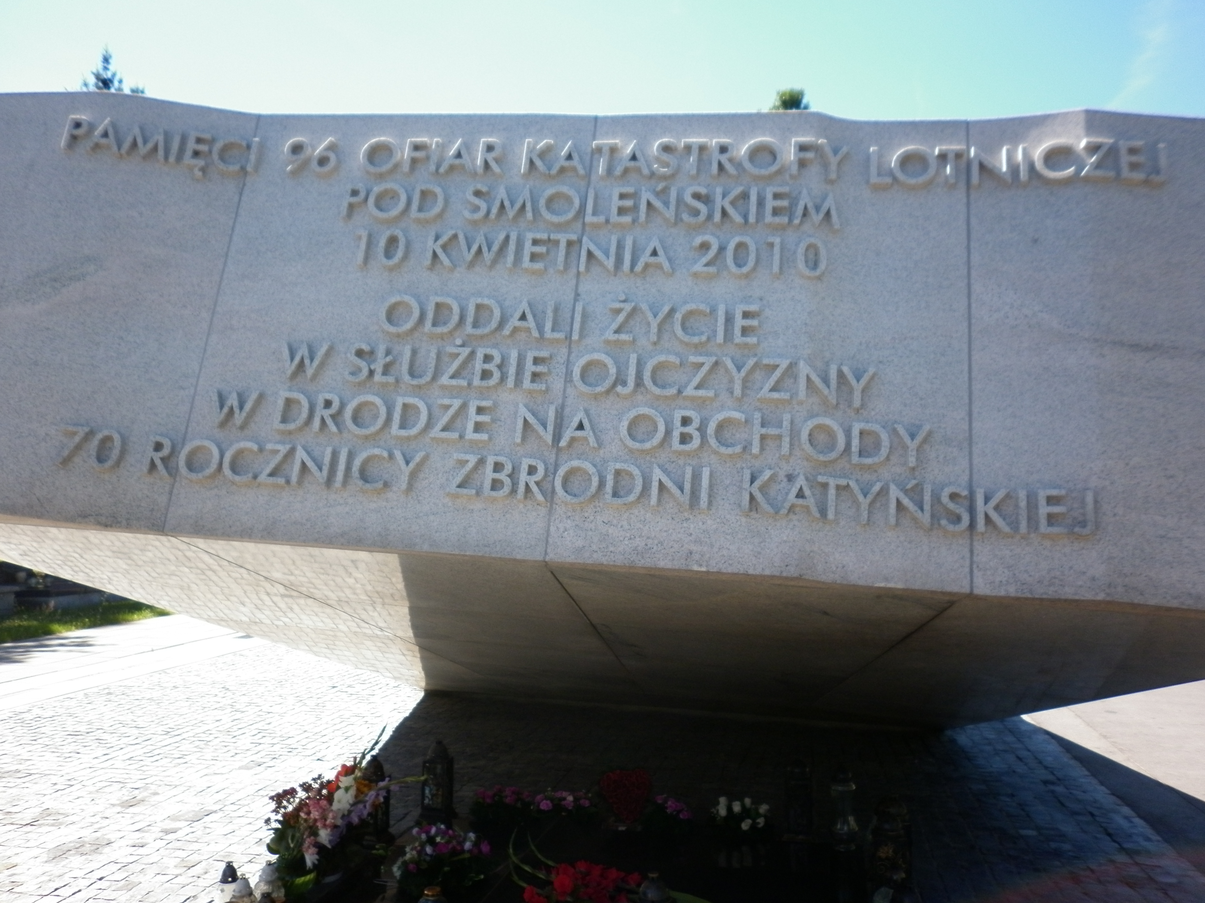 Pomnik Smoleński na Powązkach Unknown monument to victims of the 2010 polish air force tu-154 crash at the military cemetery in warsaw